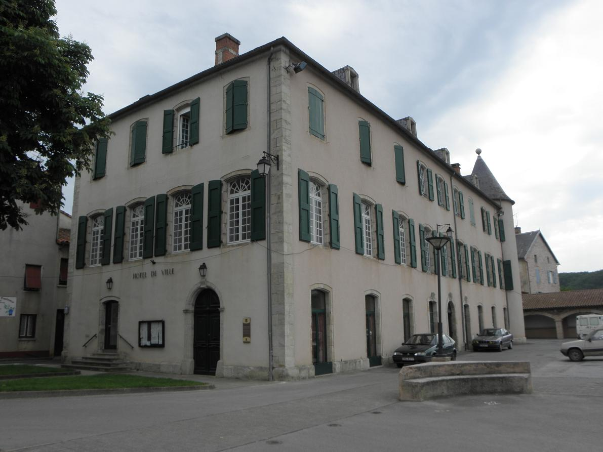 Mairie de Vabres-l'Abbaye (12).